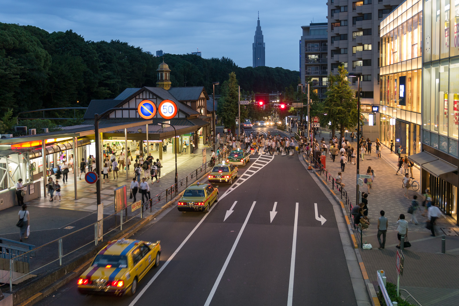 JR東日本山手線原宿駅。